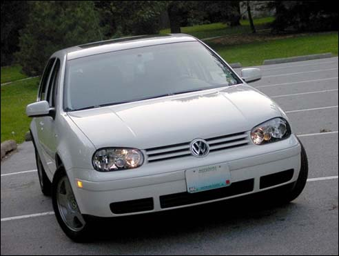 Fourth-generation Volkswagen Golf